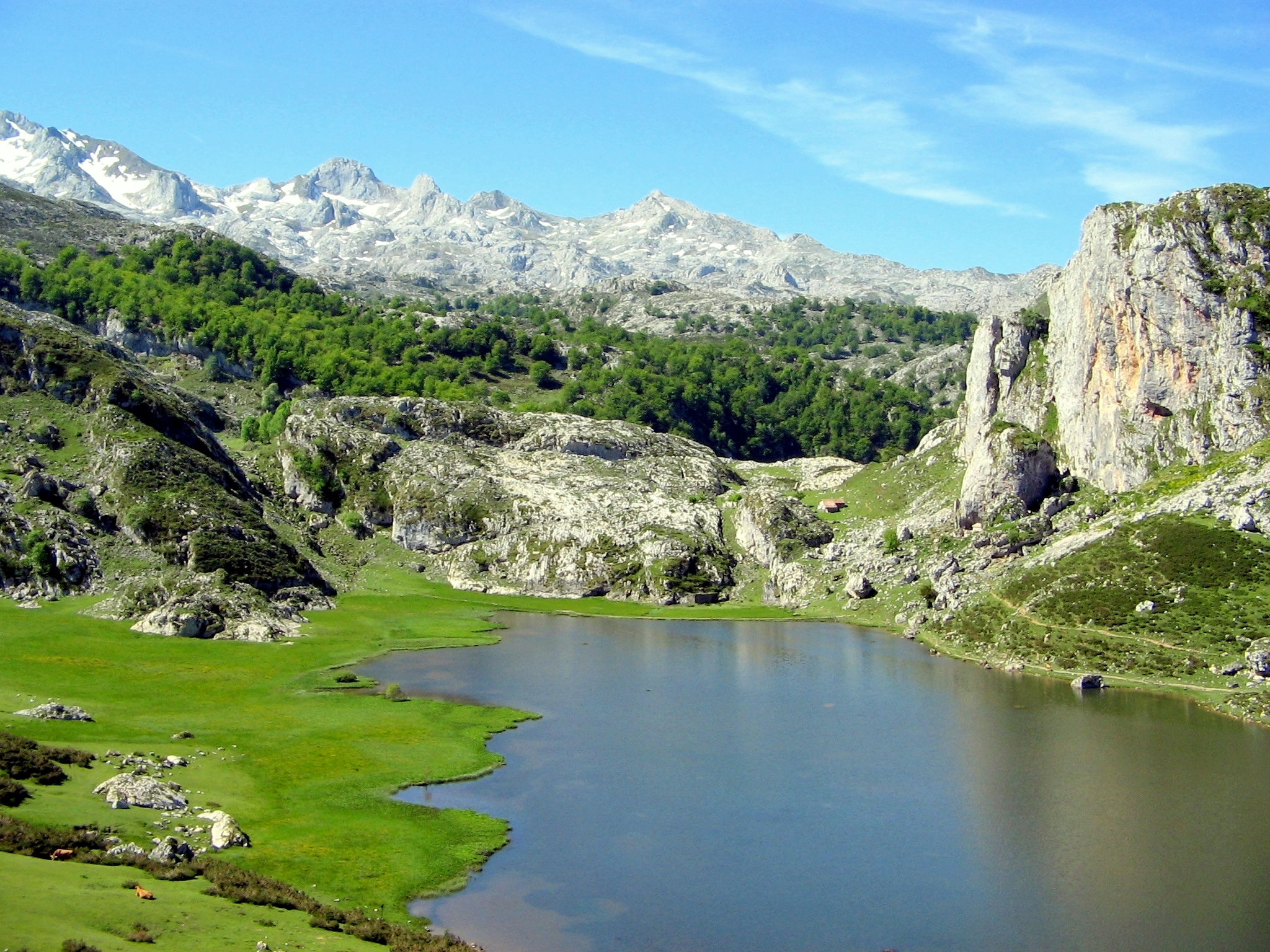 Picos de Europa This is a photography of a Site of Community Importance in Spain with the ID: ES1200001. Natura2000 entry, EEA entry